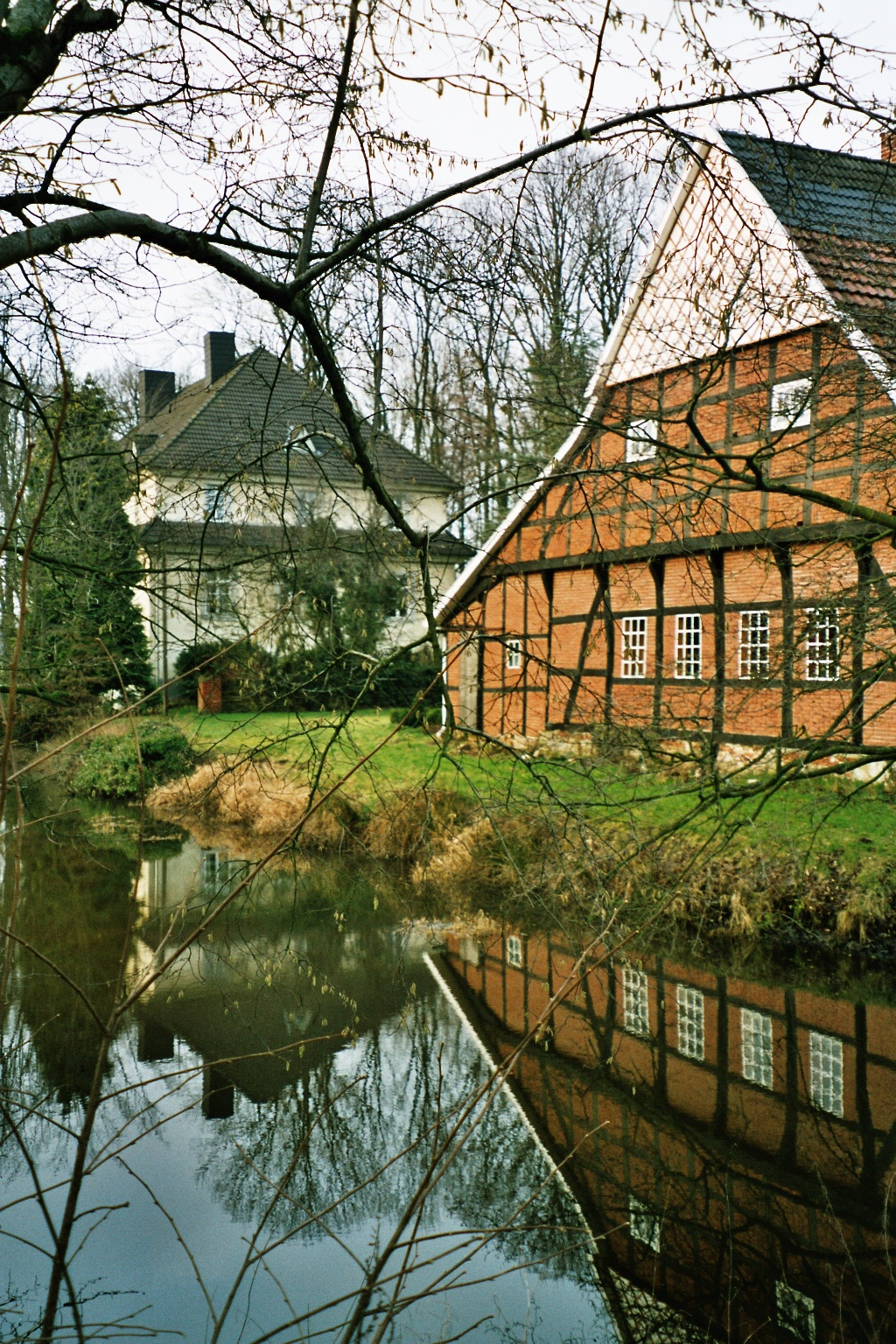 Gut Ihorst in der Gemeinde Holdorf (Landkreis Vechta)